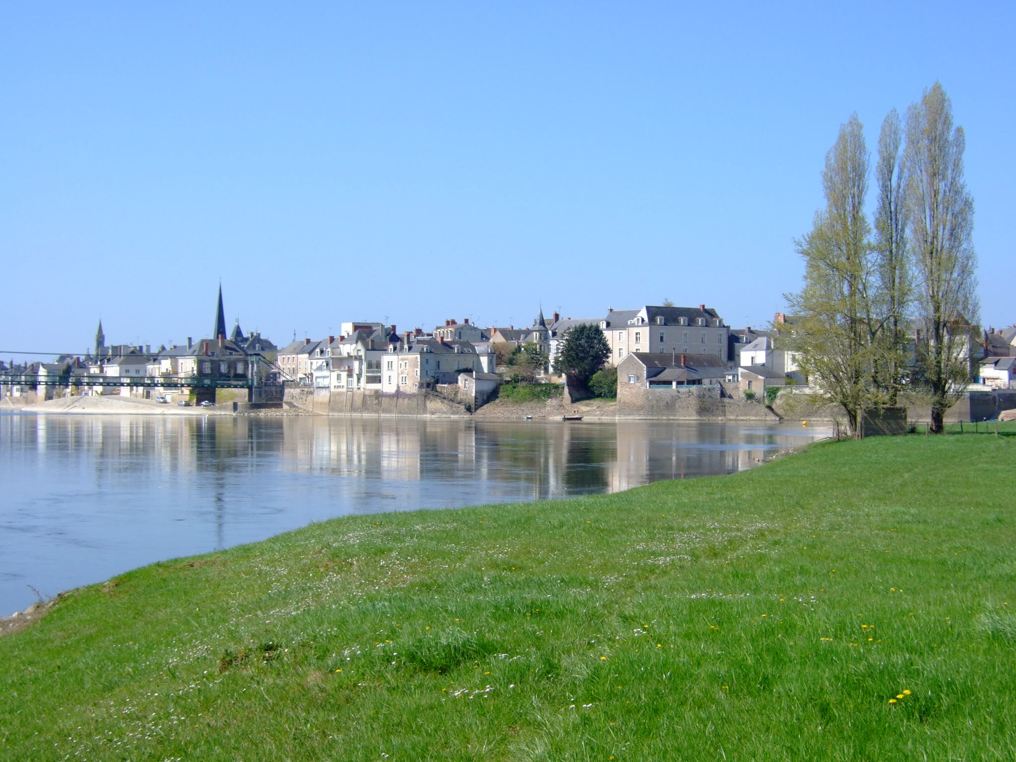 Vue générale d'Ingrandes (Maine-et-Loire)